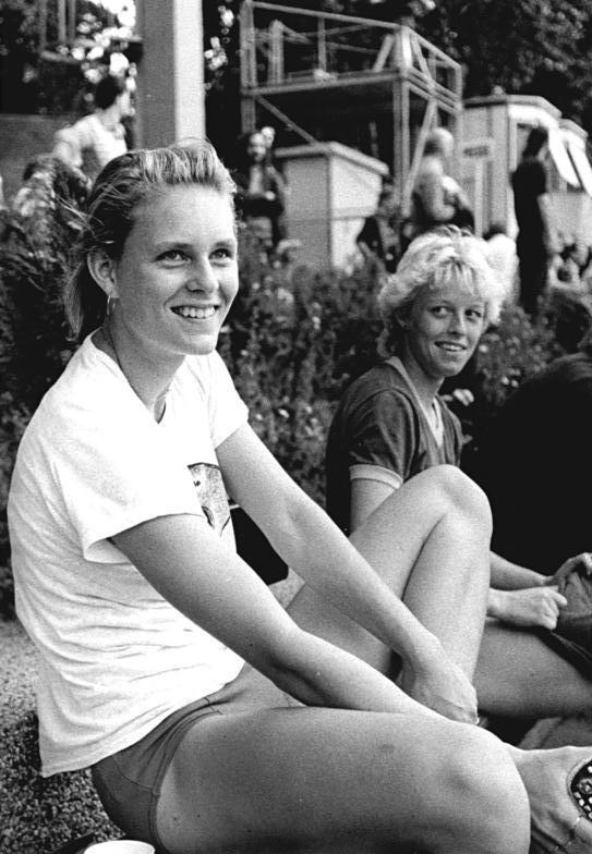 ADN-ZB-Roeske-20.7.88-Berlin: Sportfest mit Weltrekord- Beim Junioren-Sportfest verabschiedeten sich die besten Leichtathleten der DDR mit zahlreichen Paukenschlägen zu den 2. Junioren-Weltmeisterschaften. Herausragend war der neue Juniorinnen-Weltrekord durch Katrin Krabbe (SC Neubrandenburg) in 10,89 s über 100 Meter. Die dreifache JWdF-Siegerin von 1986 beeindruckte durch einen hervorragenden Start und stieß mit ihrer Superzeit auch in die Weltspitze bei den Seniorinnen vor. Schneller als sie waren in diesem Jahr nur die besten USA-Damen bei den Olympia- Ausscheidungen in Indianapolis.